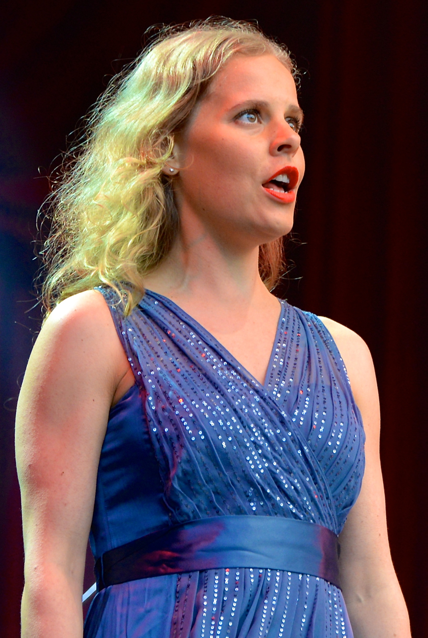 Sara Widén på en konsert på Gustav Adolfs torg under Stockholms Kulturfestival den 17 augusti 2013.